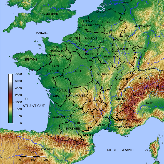 Carte France Topo Régions